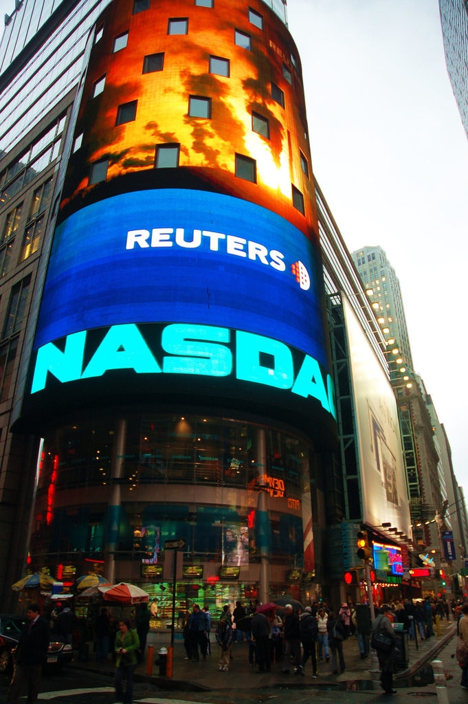 NASDAQ